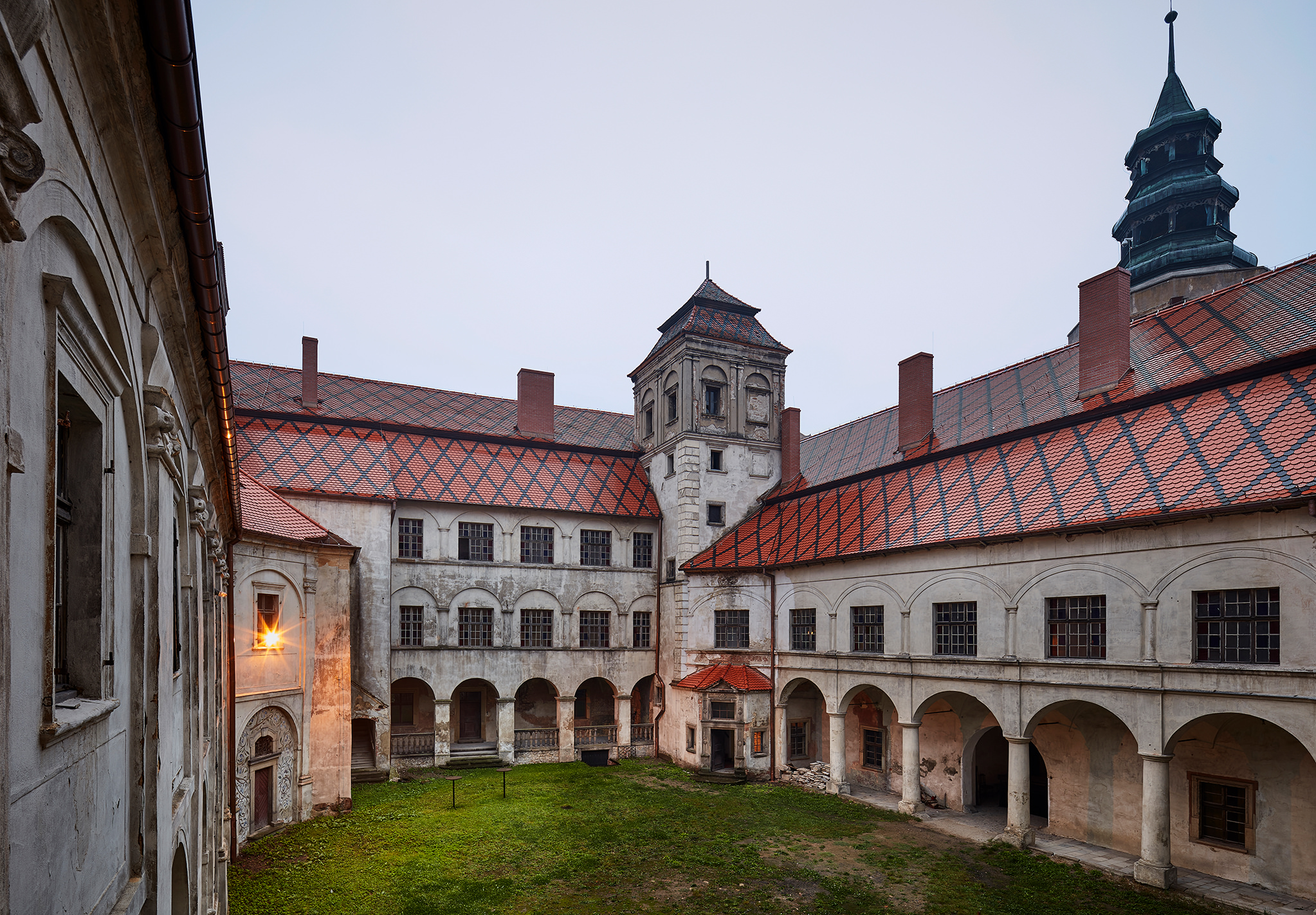 Zamek Niemodlin, dziedziniec